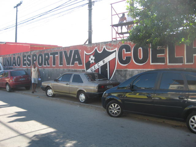 Entrada da séde do União Esportiva Coelho da Rocha, em São João de Meriti, RJ